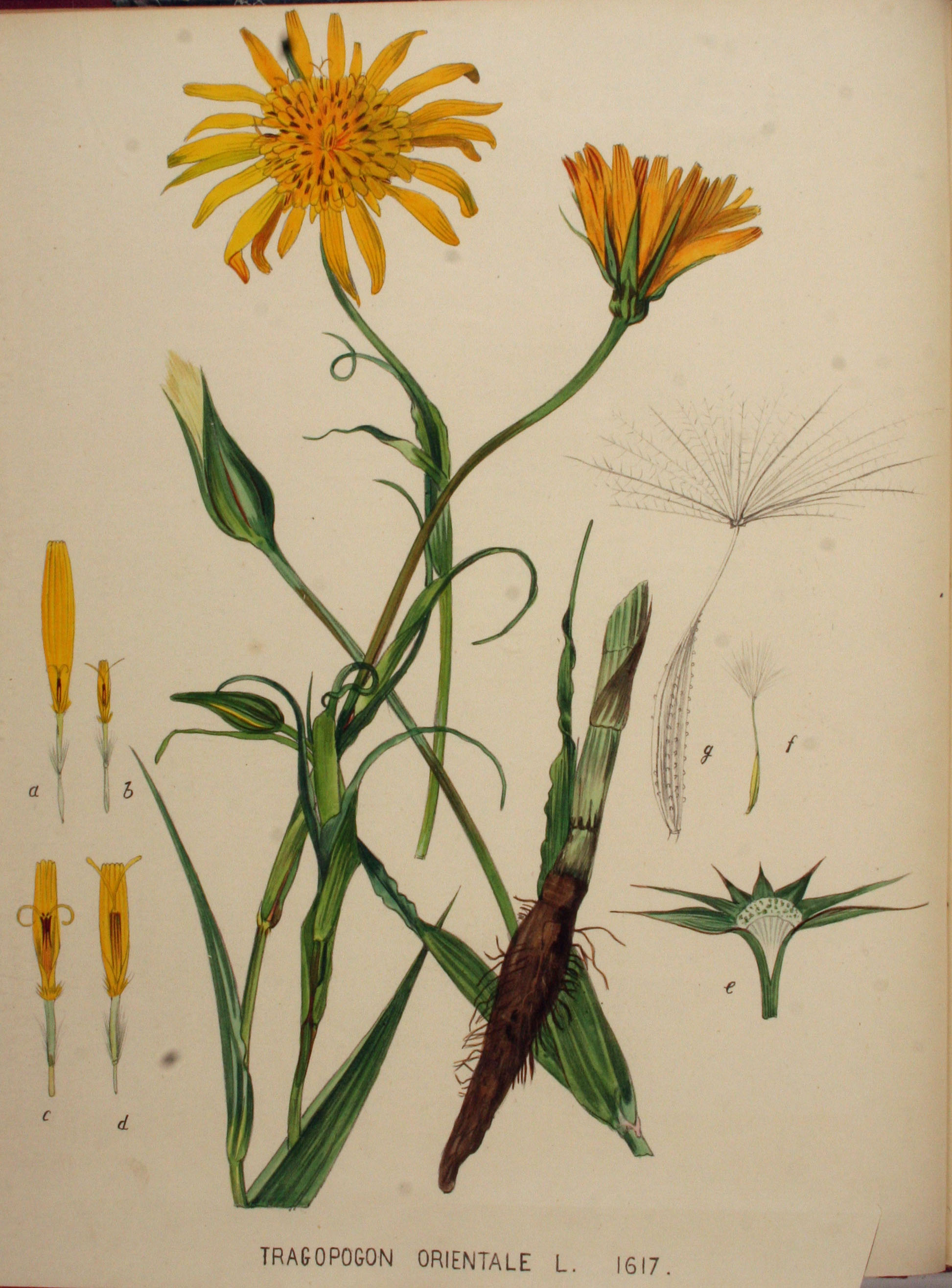 Legende: Obere und untere Teile der Pflanze. a, b Äußere Zungenblüten. c, d Innere Zungenblüten. e Blütenboden und Hülle, Längsschnitt, Blüten entfernt. f Frucht. g Frucht (vergr).